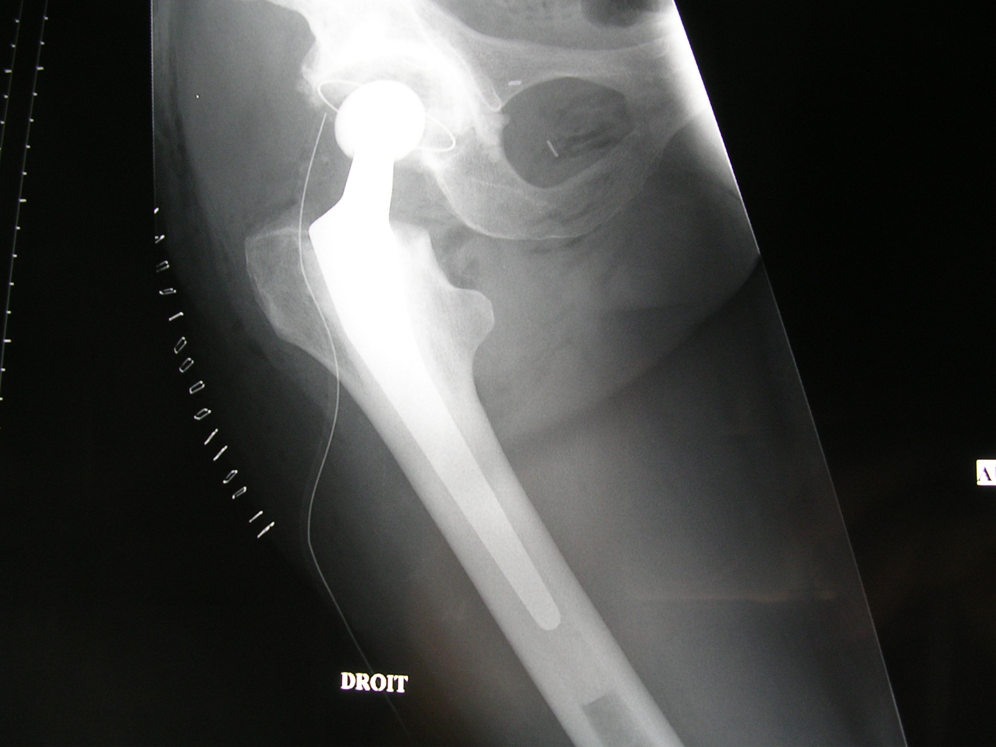 prothèse totale de hanche auteur emmanuel ucla